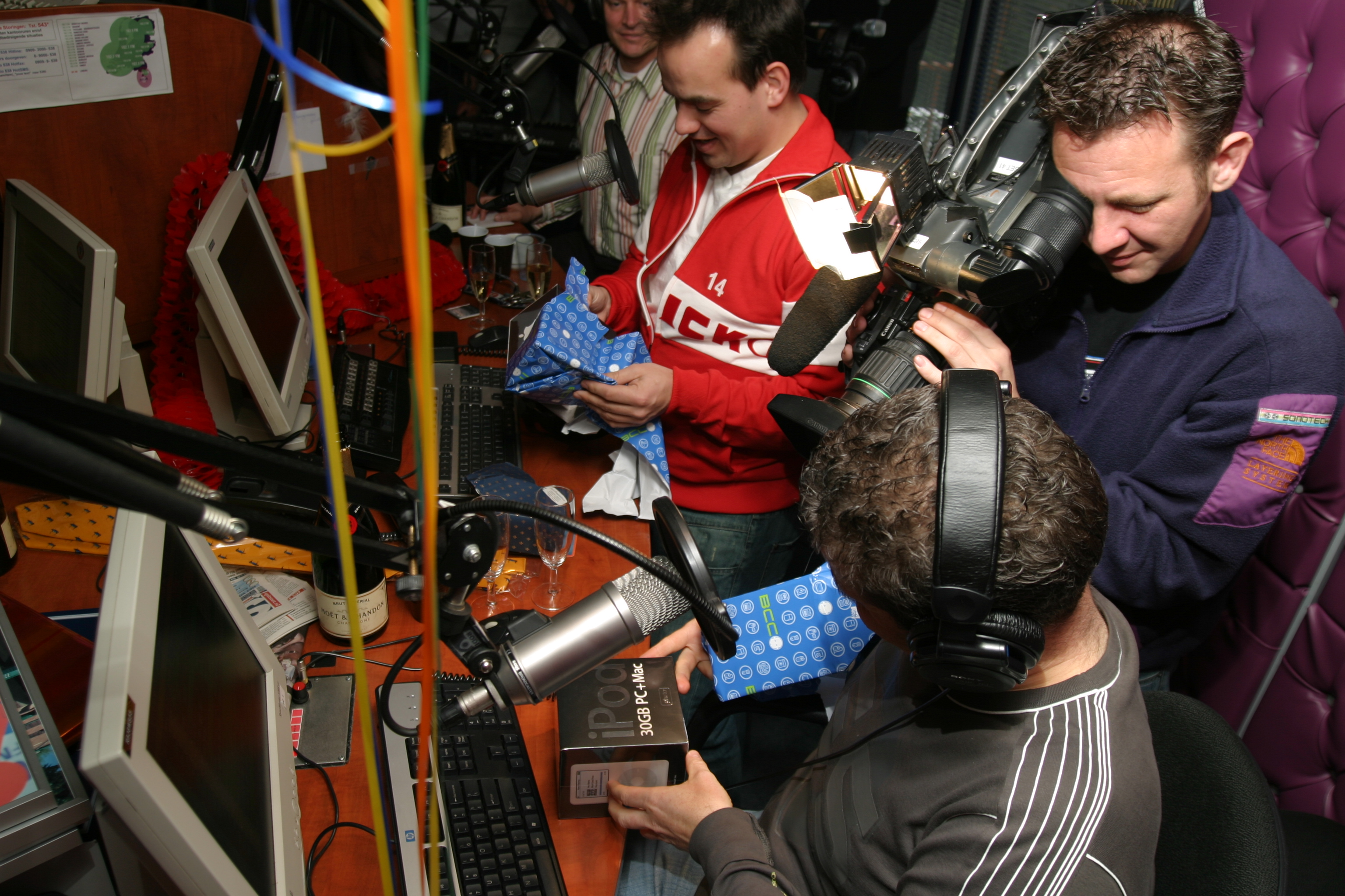 Niels en Rick krijgen een iPod photo kado van Edwin